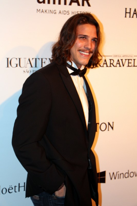 19 - Romulo Arantes Neto-003